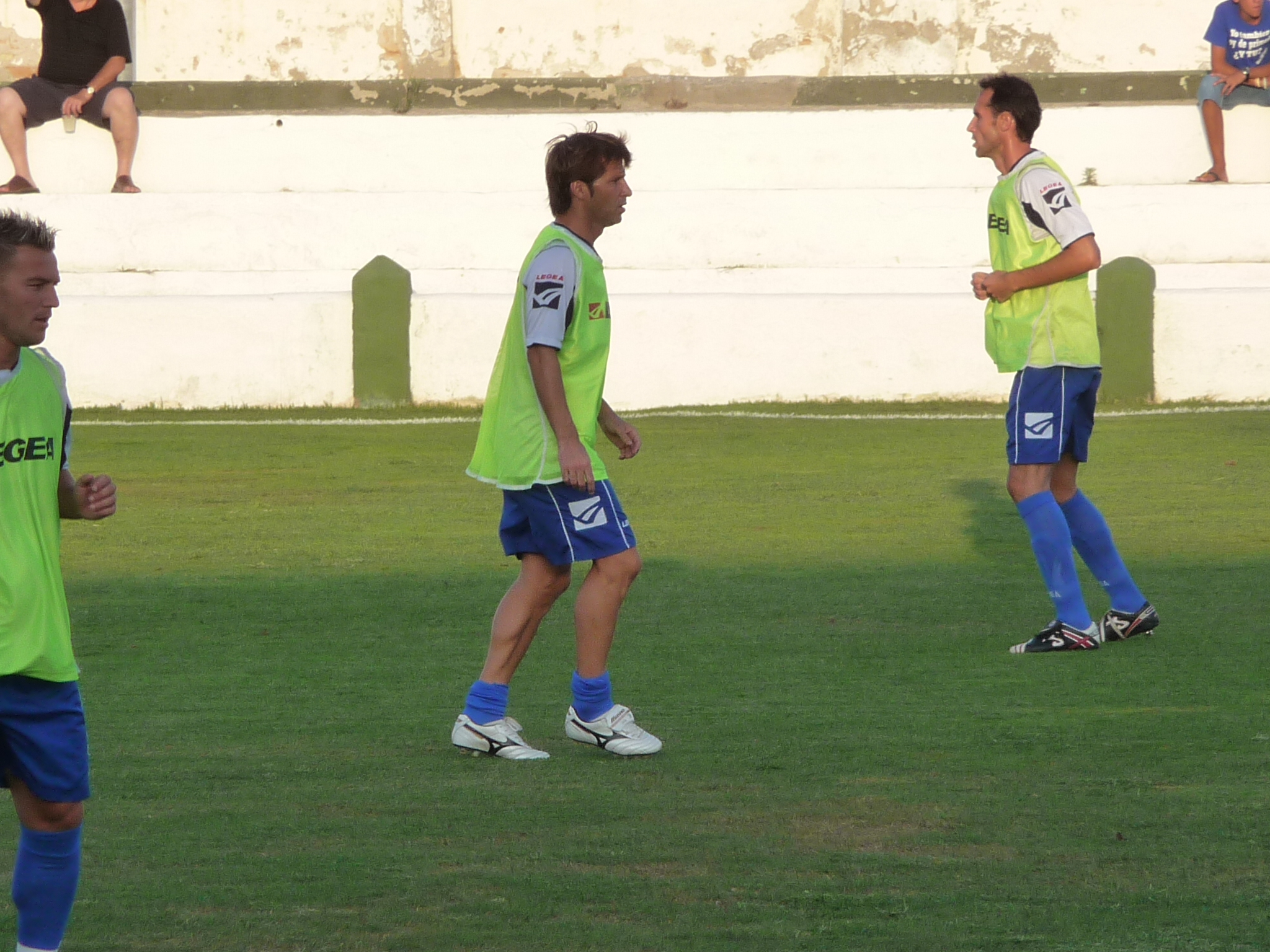 Mendoza-XerezCD-p1040353.jpg